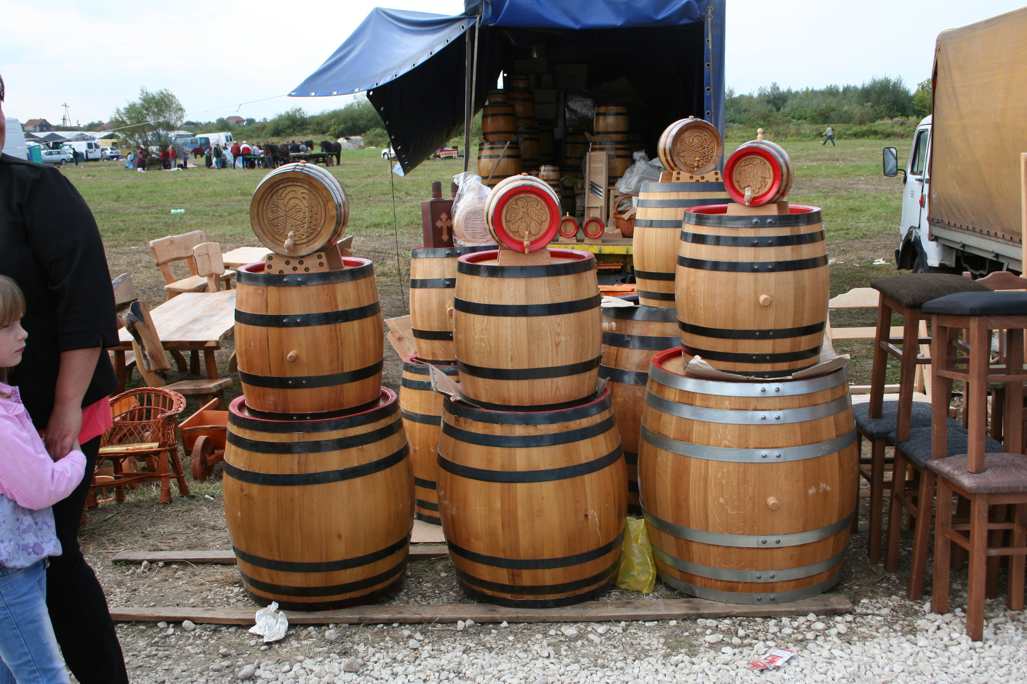 Šabački malogospojinski vašar 2016, Šabac